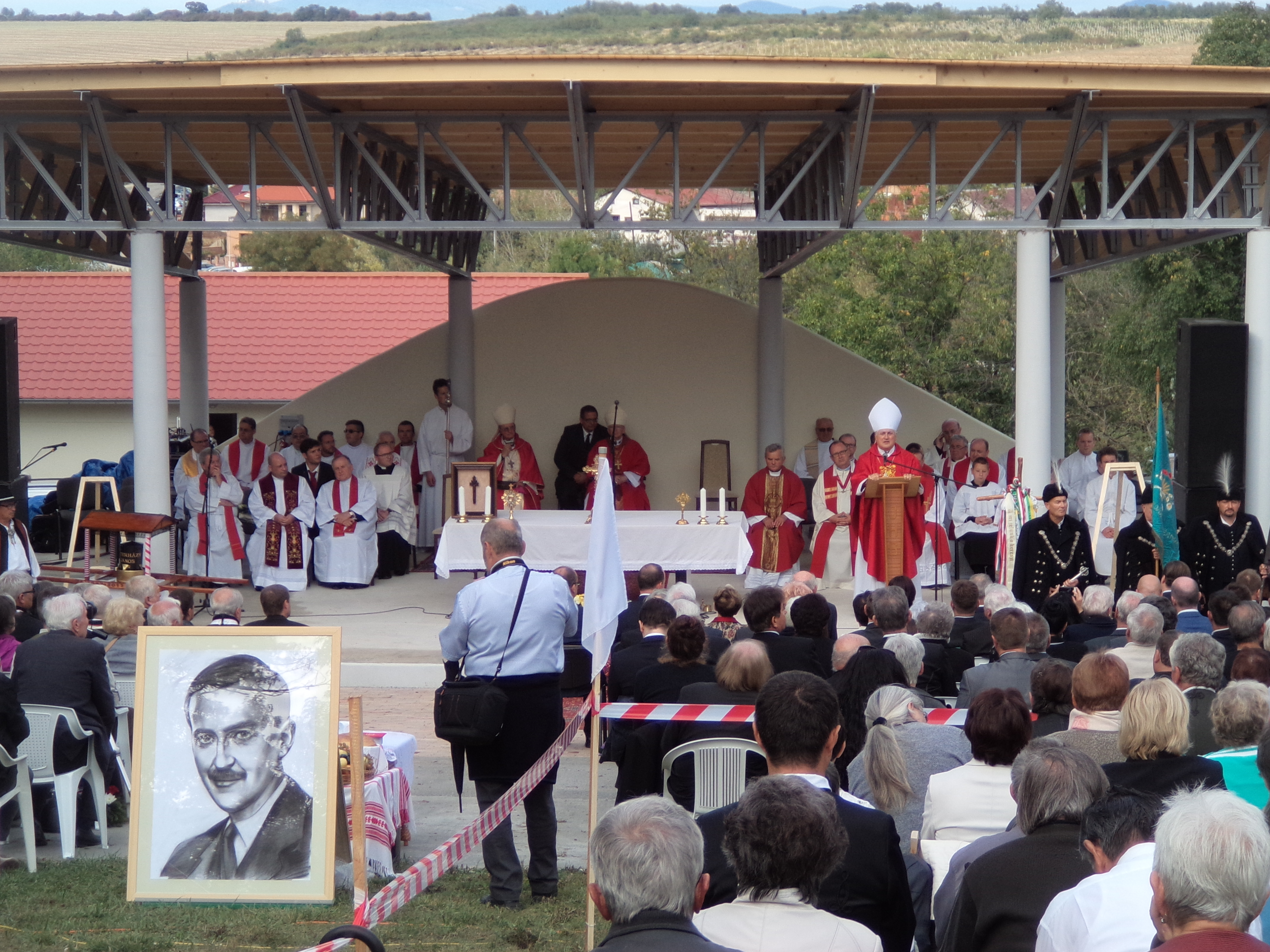 Esterházy János újratemetése az alsóbodoki Szent Kereszt Felmagasztalása-kápolnában 2017. szeptember 16-án